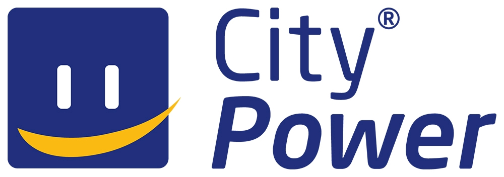 Das CityPower-Logo - Erkennungsmerkmal für das Vorteilssystem CityPower